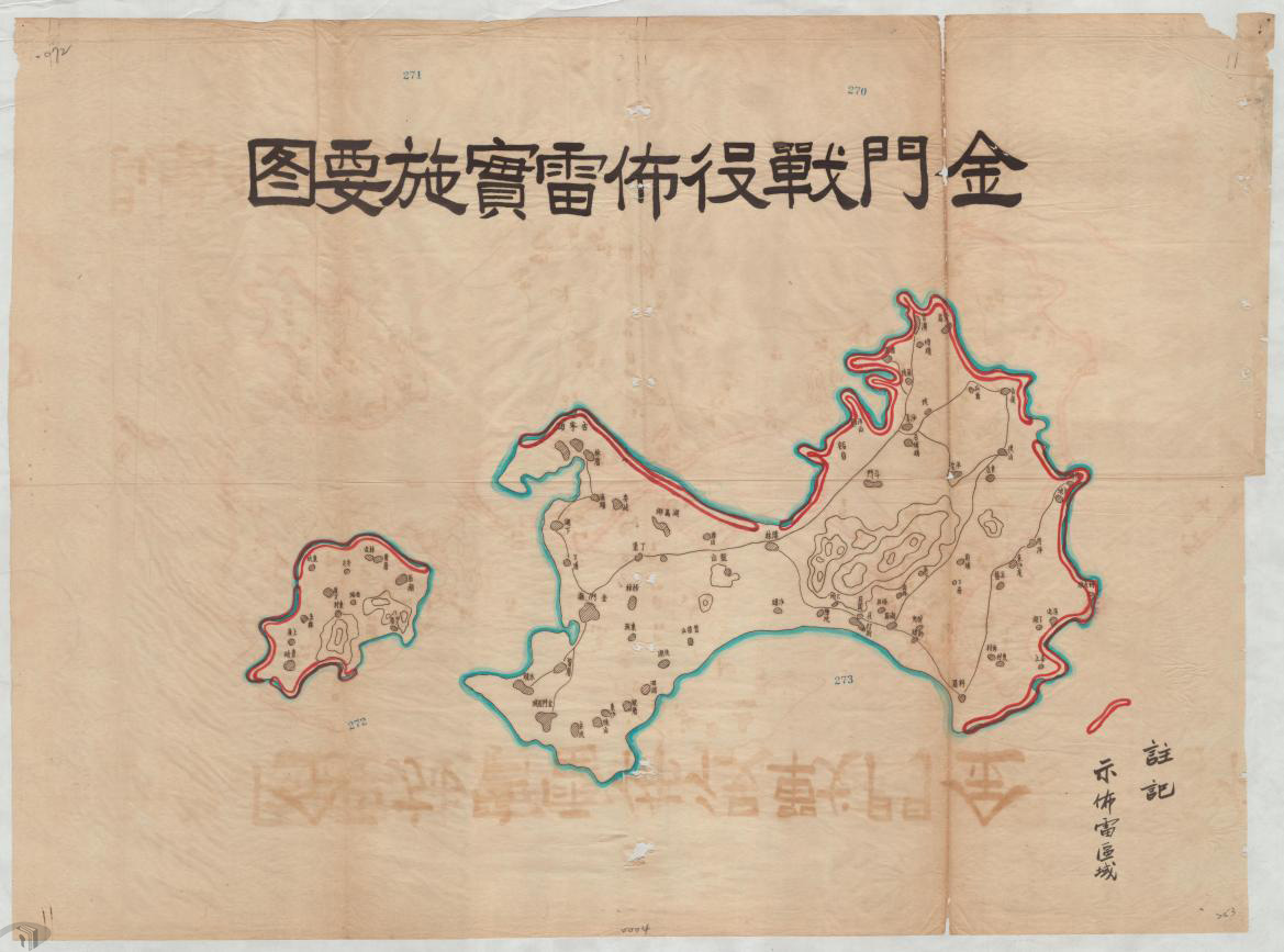 第十二兵團第19軍技術總隊沿海岸安置炸藥、地雷圖